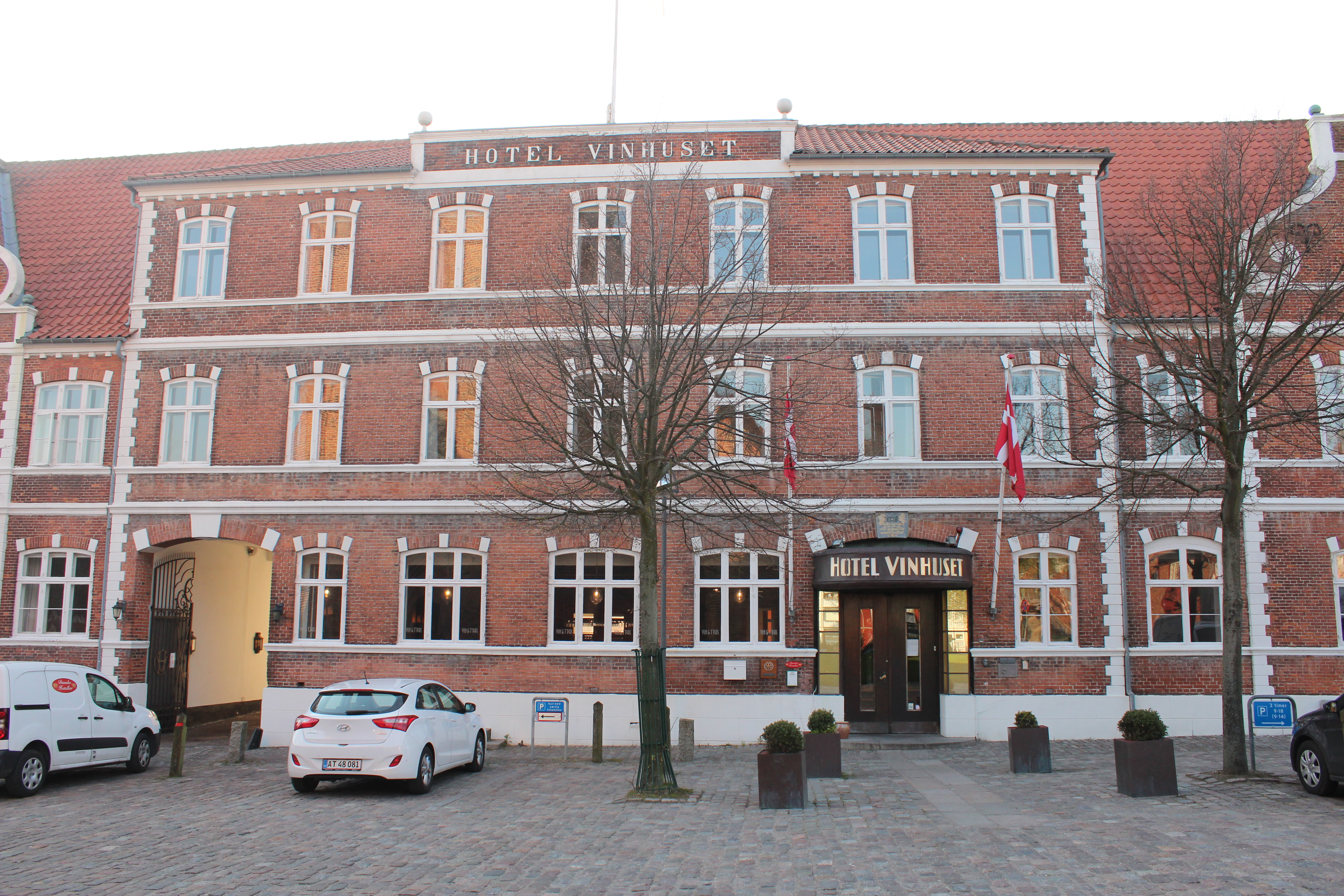 Opført i 1778. Kælderen rummer stadig middelalderlige rester.